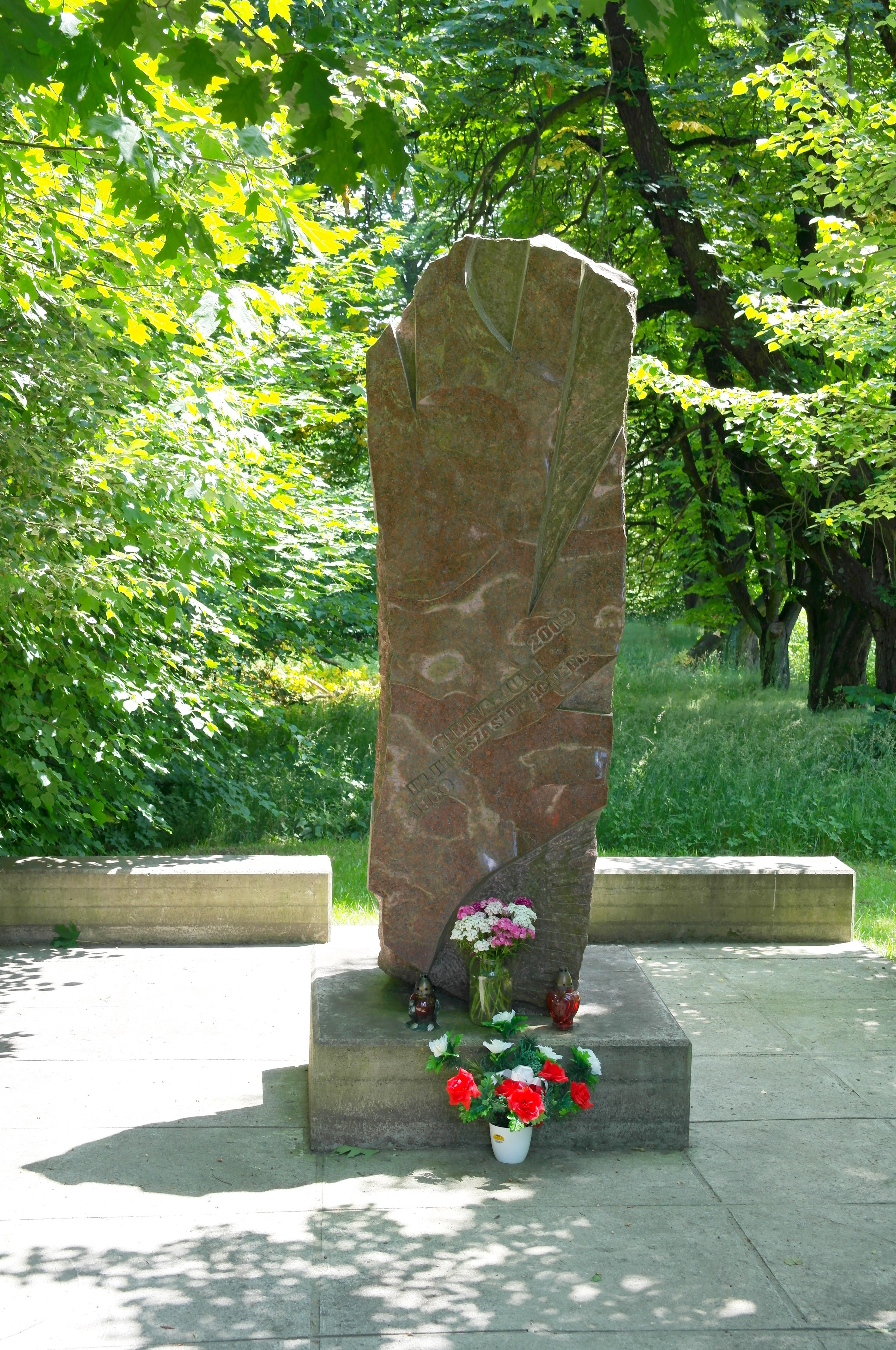 Obelisk na Obrokach w miejscu gdzie stało polskie gimnazjum